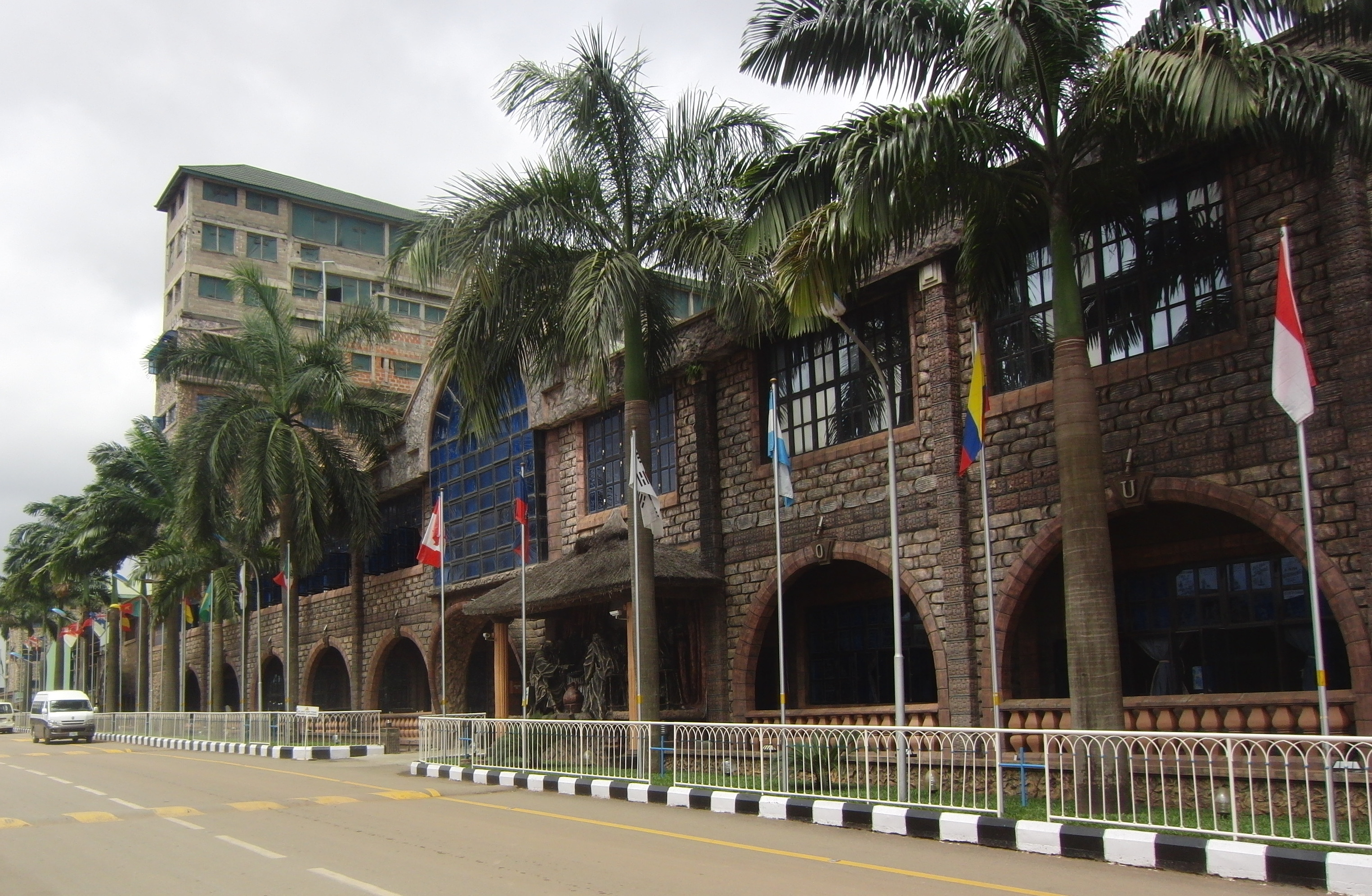 Seitenansicht der Synagogue-Kirche in Lagos Nigeria